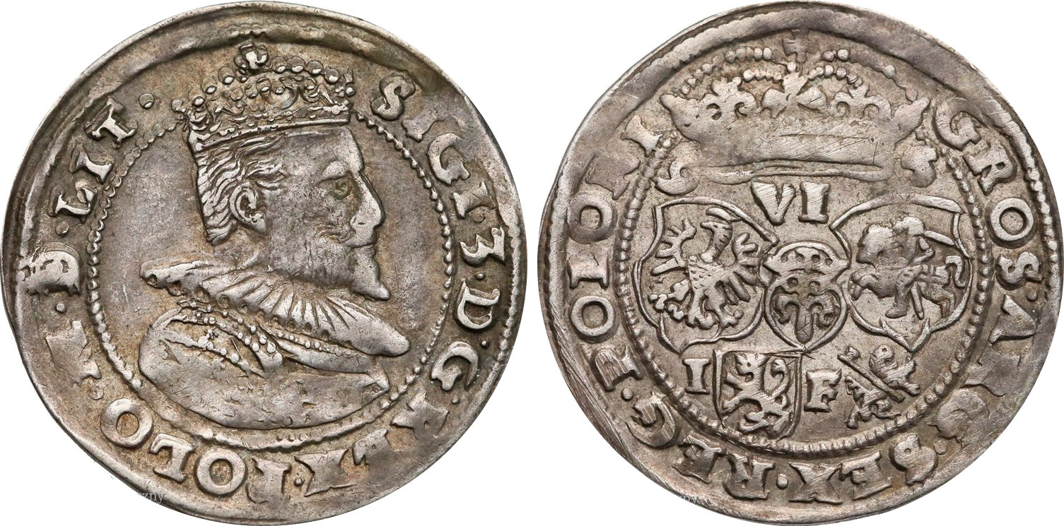 Szóstak koronny 1595 Lublin